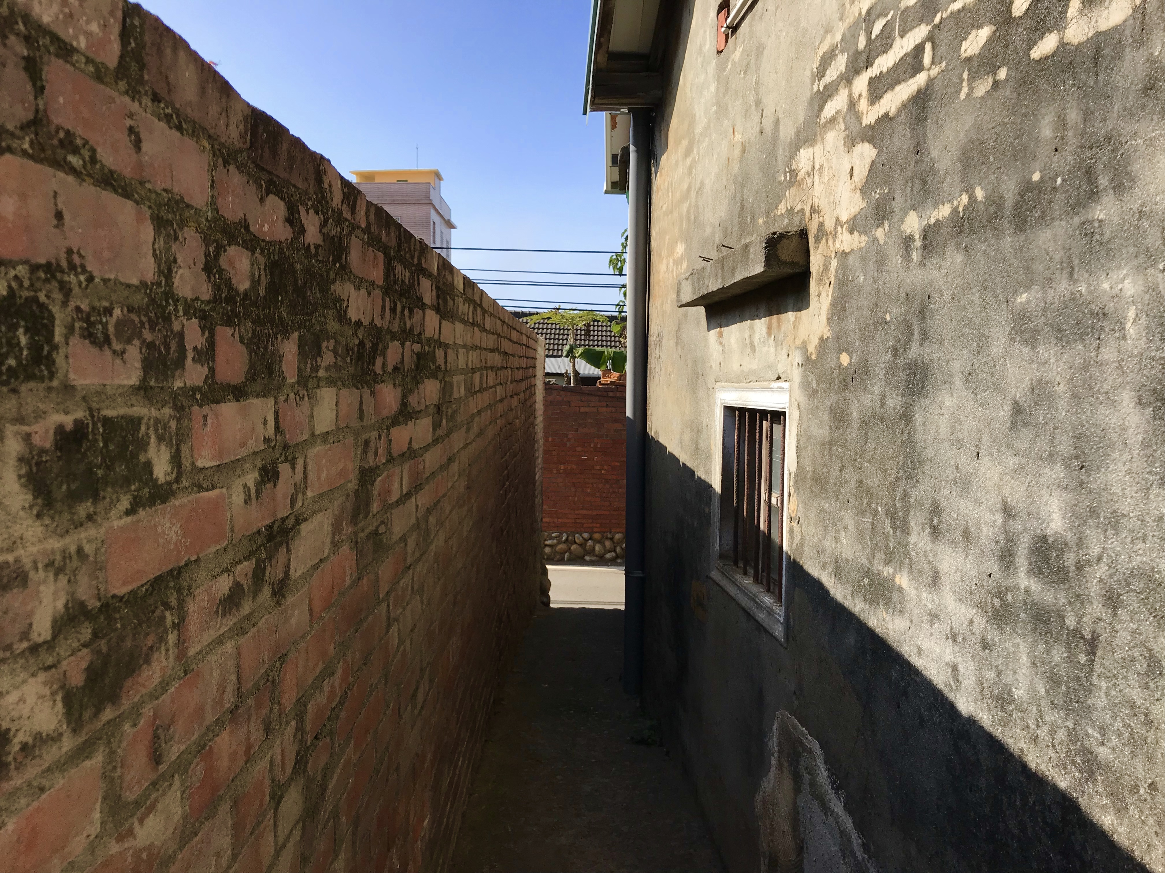 花甲男孩轉大人場景之一台中市大肚區瑞錦社區小巷